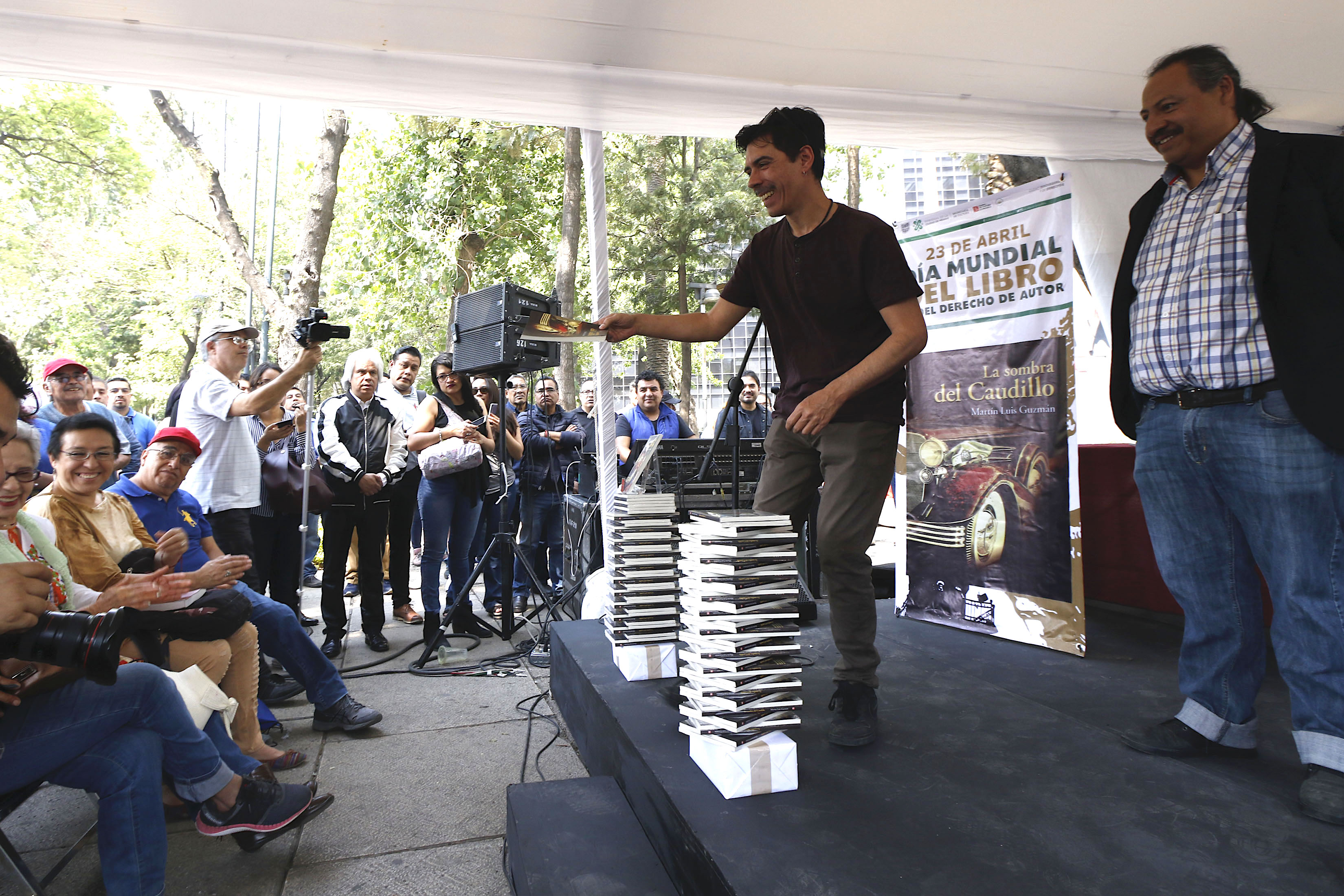 Martes 23 de abril de 2019. En la Columna de la Independencia, inició la conmemoración del Día Mundial del Libro y de los Derechos de Autor, con la entrega del libro La Sombra del Caudillo, de Martín Luis Guzmán, de forma gratuita a transeúntes y automovilista; con la presencia de Paco Ignacio Taibo II y Francisco Pérez Arce, encargados y miembro del equipo editorial del FCE, respectivamente, así como Benjamin González Pérez, director general de Vinculación Cultural Comunitaria de la Secretaría de Cultura de la Ciudad de México. Fotografía: Milton Martínez / Secretaría de Cultura de la Ciudad de México.